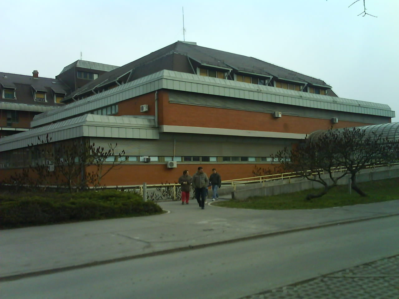 Bolnica u Vrbasu